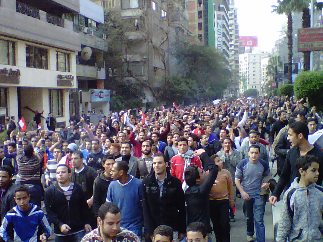 IMG00064-20110125-1429